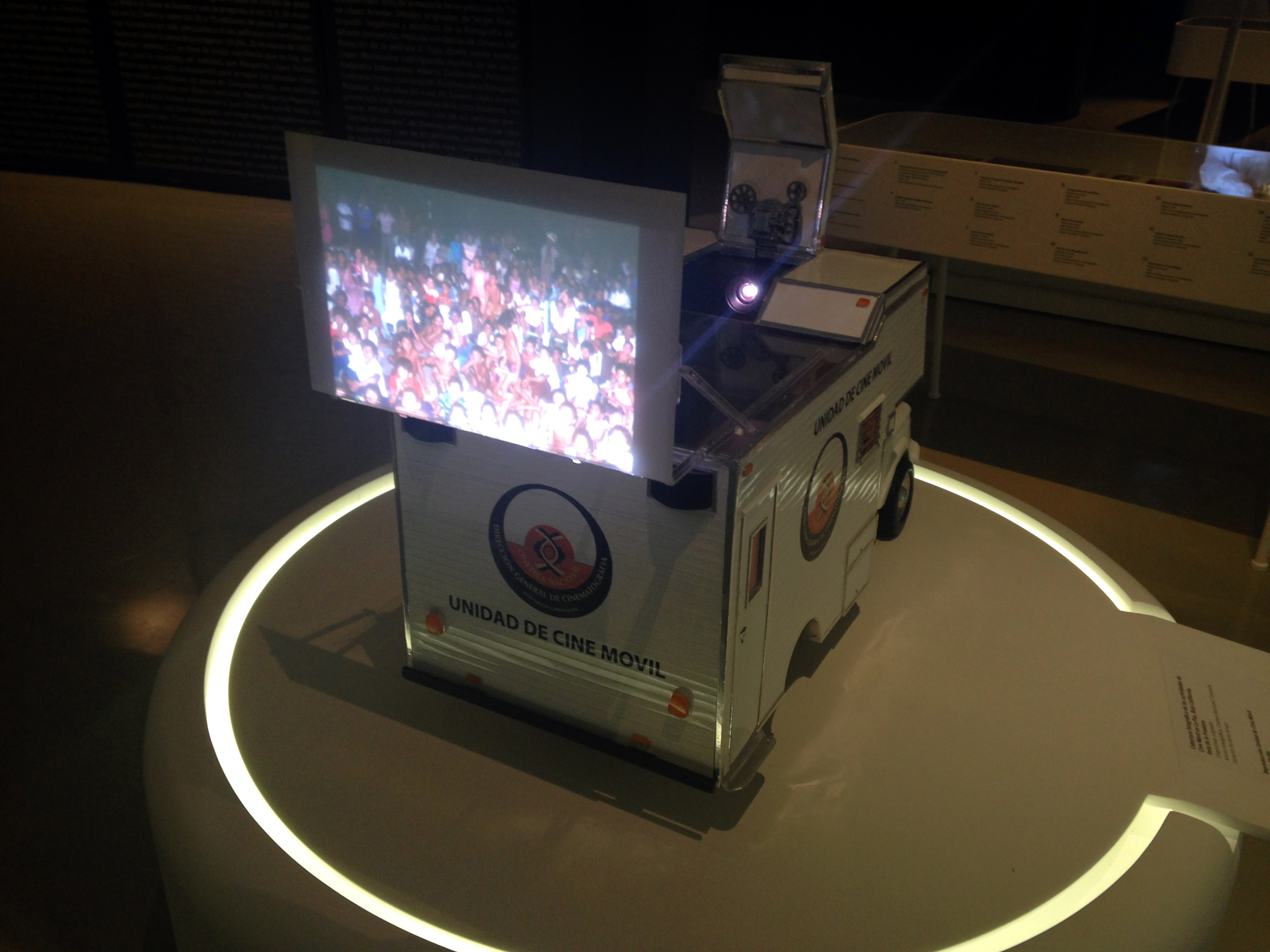 Modelo a escala de la camioneta del proyecto Cine Móvil, que operó de 1976 a 1982 en México. Tomada en la Cineteca Nacional.